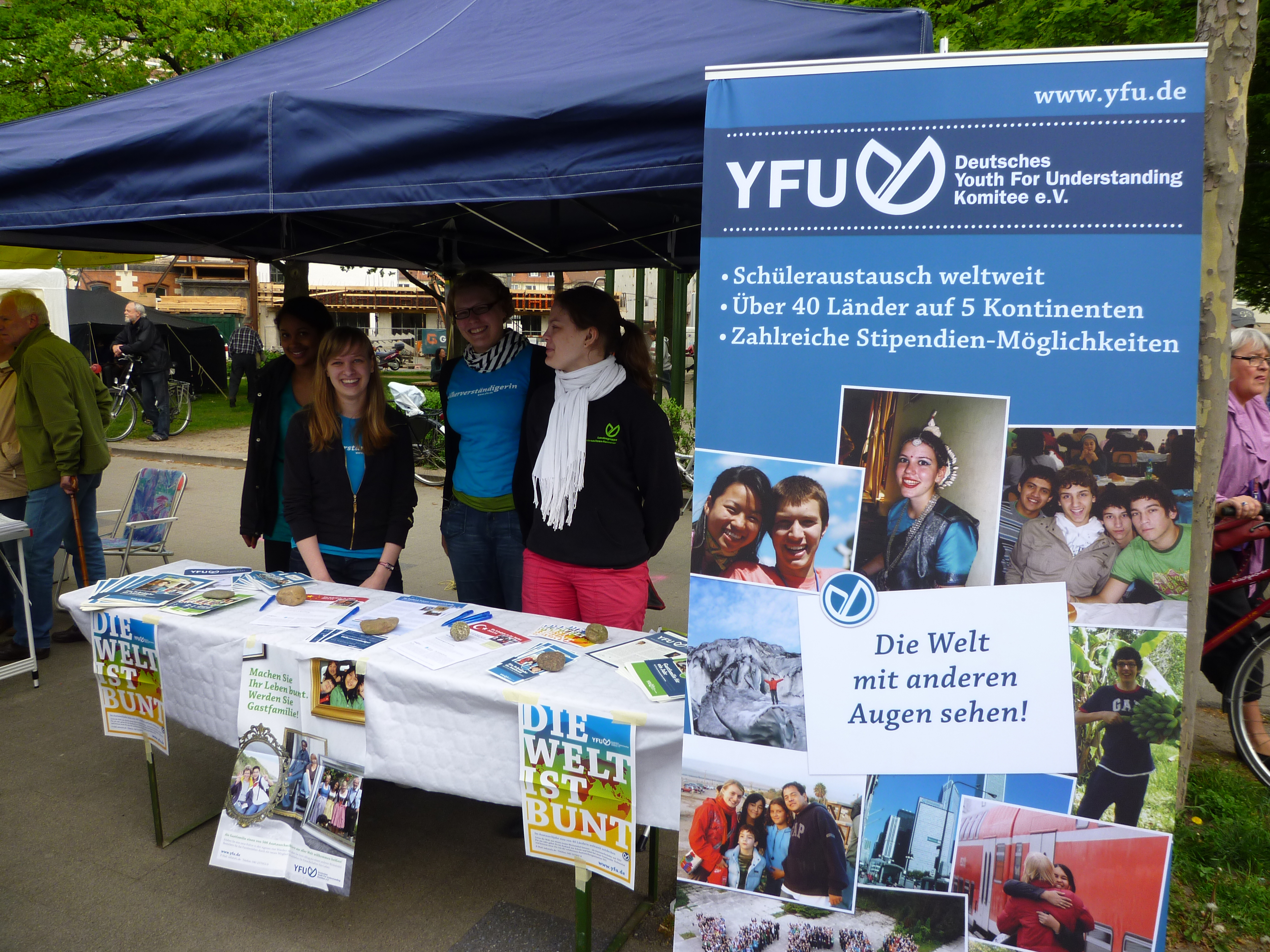 Sie haben ein besseres Bild? Sogar ein historisches! Zeigen Sie's uns. Wikipedia gehört uns. Allen Menschen.